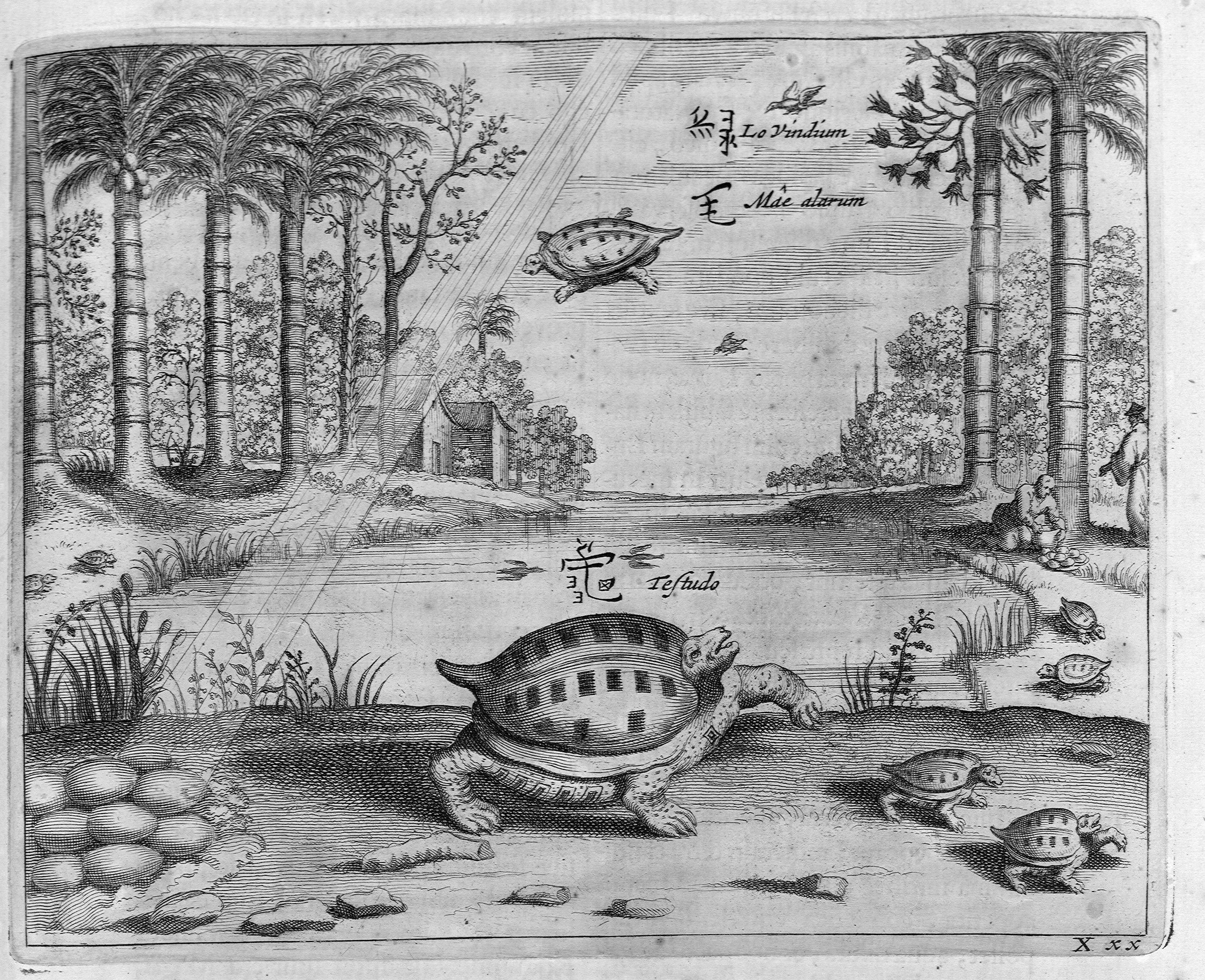 Autor: Kircher, Athanasius, (S.I.), 1602-1680 Descripción bibliográfica: Athanasii Kircheri... China monumentis : qua sacris quà profanis, nec non variis naturae & artis spectaculis, aliarumque rerum memorabilium argumentis illustrata ... - Amstelodami : Apud Joannem Janssonium à Waesberge & Elizeum Weyerstraet, 1667 . - [14], 237, [11] p., 24 lám. de grab., 2 mapas: il.; Fol.- Elenchus librorum a P. Athanasio Kirchero e Societate Jesu editorum (2H4). Al final del mismo: "Juxta exemplar Romae, typis Varesii ..." Materia: China - Descripciones y viajes Notas: Sign.: [Ast.]-2[Ast.]4, A-2H4. - Texto a dos col. - Port. con grab. con anagrama de la Compañía de Jesús . - Precede a la port. lám. de grab. alegórico. Precede al Fol. I retrato grab. del autor. - Las h. de grab. calc., 3 de ellas pleg. (dos mapas e inscripción en caracteres chinos), las 23 restantes son: un retrato del autor, Inscripciones siríacas y sánscritas, personajes y vestimenta mogoles, tártaros y chinos, etc. - Las il. calc. intercaladas en el texto son escenas costumbristas y fauna y flora de China Impresor: Janssonius van Waesberge, Johannes, fl. 1642-1681, imp. Impresor: Weyerstraet, Elisée, imp. Lugar de impresión: Holanda. Amsterdam Localización: Vea la ilustración en su contexto Libro completo en pdf